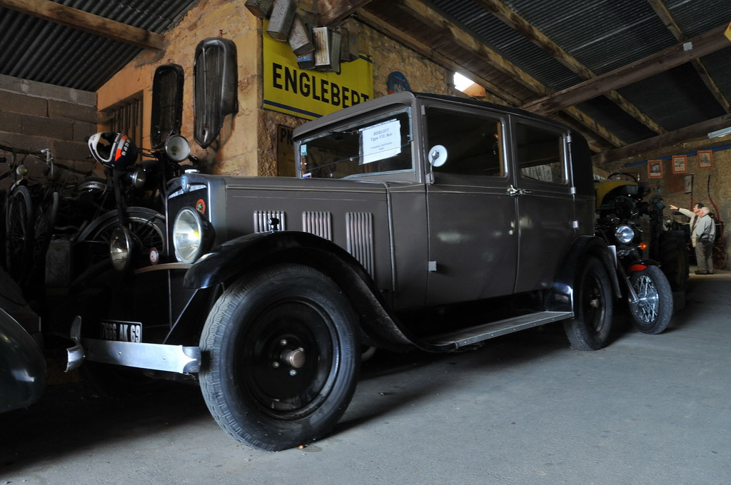 Berliet is één van de voorgangers van Renault Trucks en bussen. Marius Berliet (1866 - 1948) begon in 1893 met het bedenken en construeren van zijn eerste verbrandingsmotor. Dit resulteerde in 1894 in de eerste functionerende automobiel van zijn hand. In 1902 nam hij de activiteiten over van de constructeur Audibert et Lavirotte uit Lyon en begon met het maken van modellen met viercilindermotoren voorzien van ‘honingraat-radiateurs’ en een dragende constructie van metaal in plaats van (het toen gebruikelijke) hout. In 1913 was Berliet in staat de productie op te voeren tot 3.500 eenheden per jaar in de fabriek te Monplaisir. Gedurende WO I produceerde Berliet, net als Renault en Latil, vrachtauto’s voor het Franse leger. Berliet beëindigde de productie van personenauto’s in 1939.